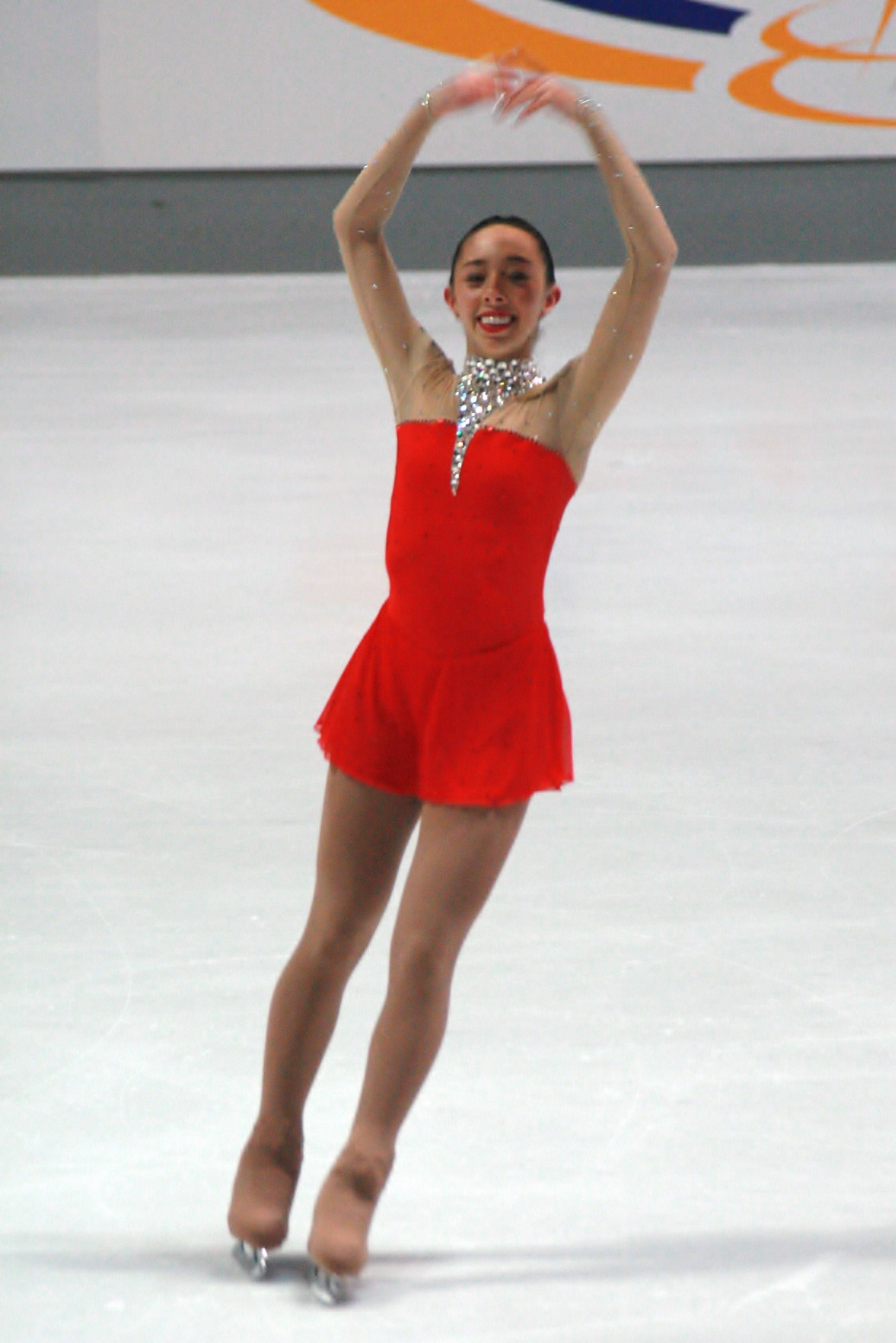 Брукли Хан (Австралия) на 2013 Nebelhorn Trophy.